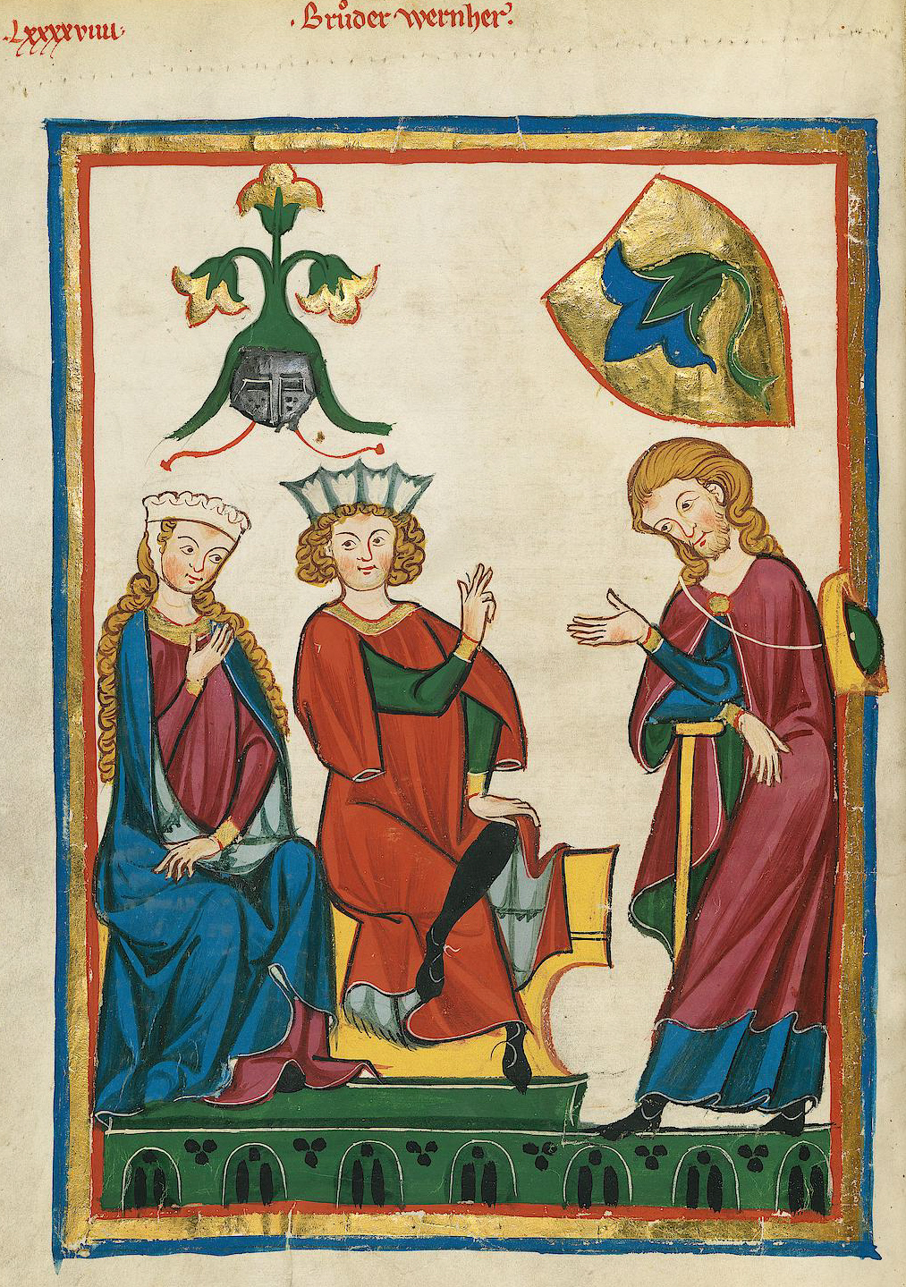 Codex Manesse, UB Heidelberg, Cod. Pal. germ. 848, fol. 344v, Bruder Wernher